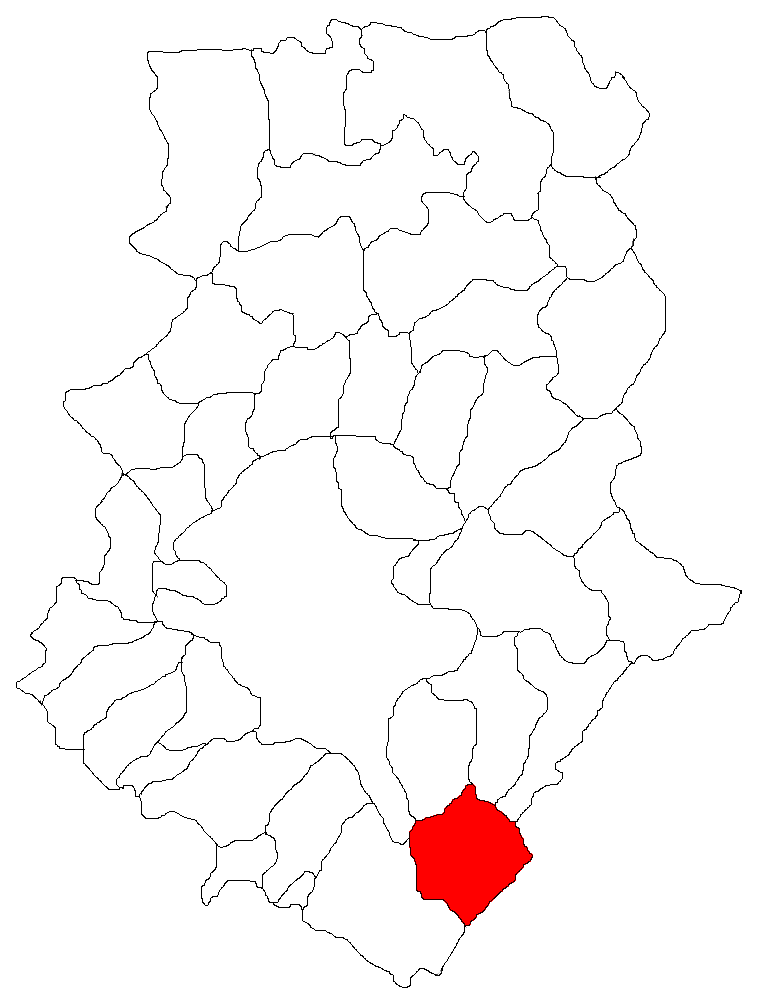 Categorie:Hărţi ale judeţului Ilfov